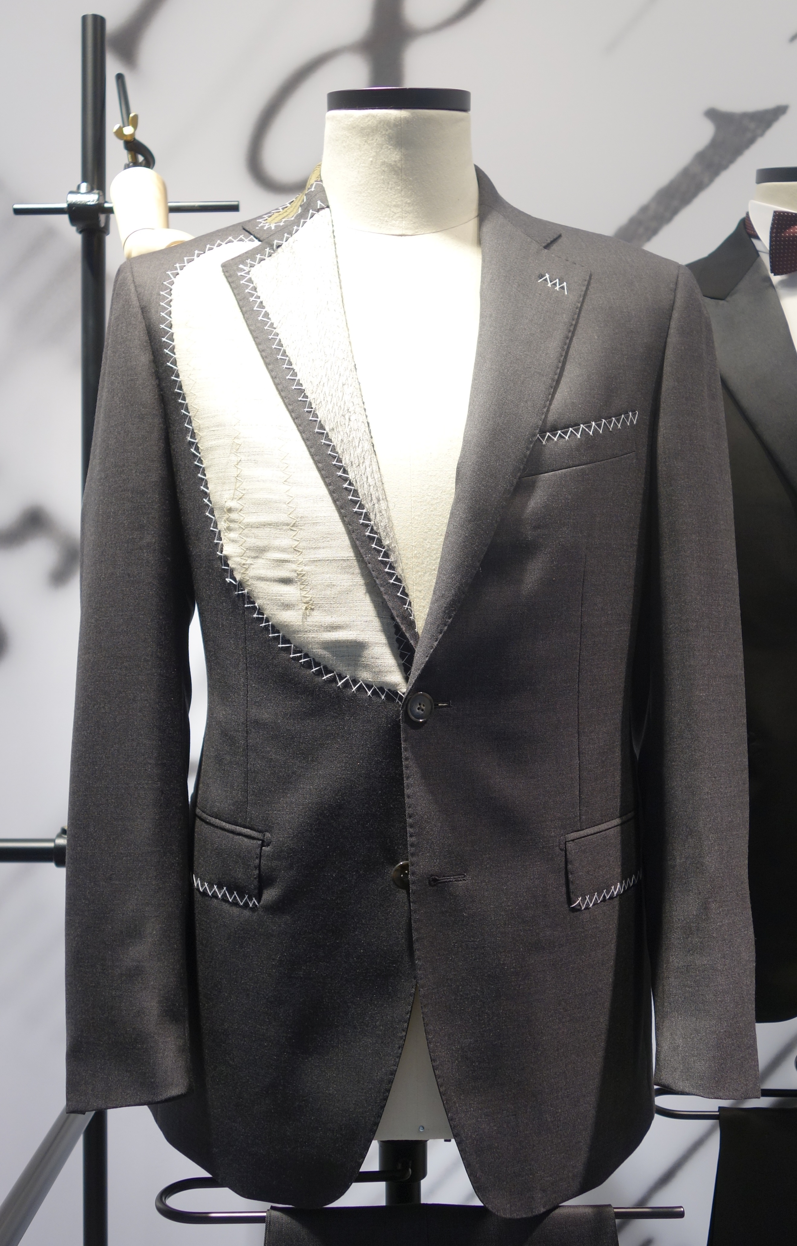 Jacket eines Herren-Maßanzugs mit Half-Canvas-Verarbeitung mit Rosshaar im Brust- und Reversbereich. Paul Rosen bei Peek & Cloppenburg, Düsseldorf.